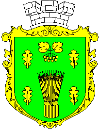 Герб села Малехів